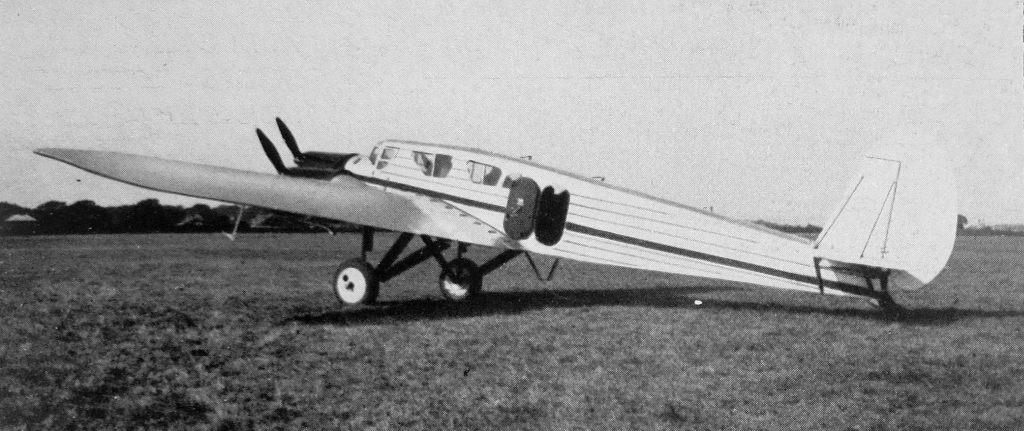 letecký motor Walter Major 4 a letoun Spartan Cruiser (1934)